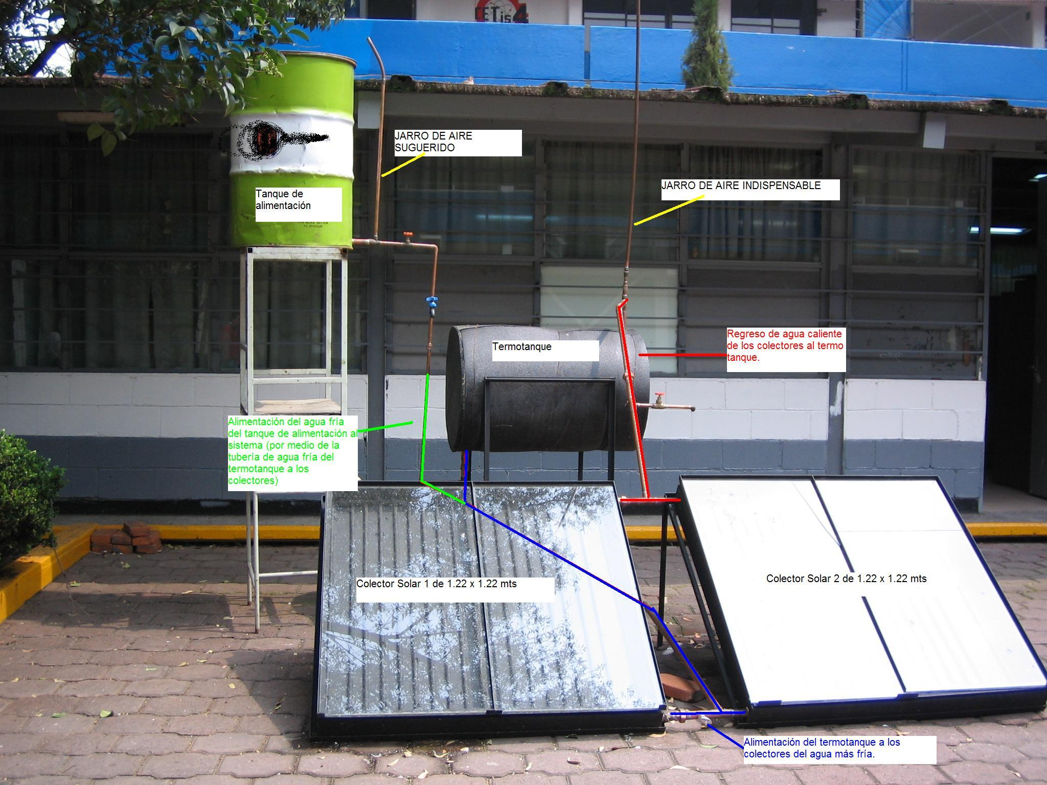 Las difernetes componentes se conectan entre sí para completar el sistema completo de un calentador solar plano, desde el tanque de alimentación, el termotanque, dos colectores, hasta el sistema de tuberías y conexiones.